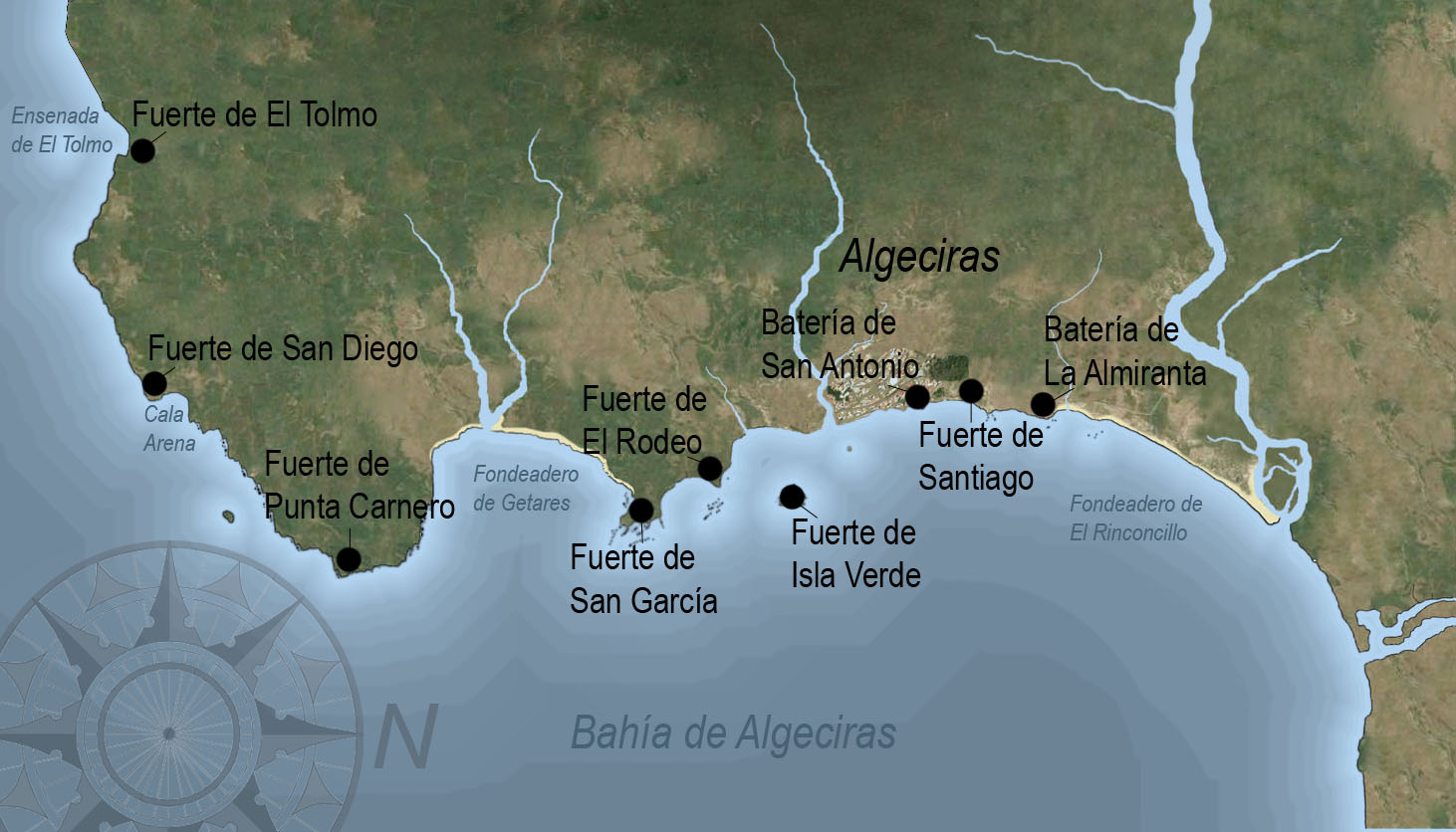 Mapa descriptivo de los fuertes situados en los entornos de la ciudad de Algeciras, Andalucía (España), durante el siglo XVIII